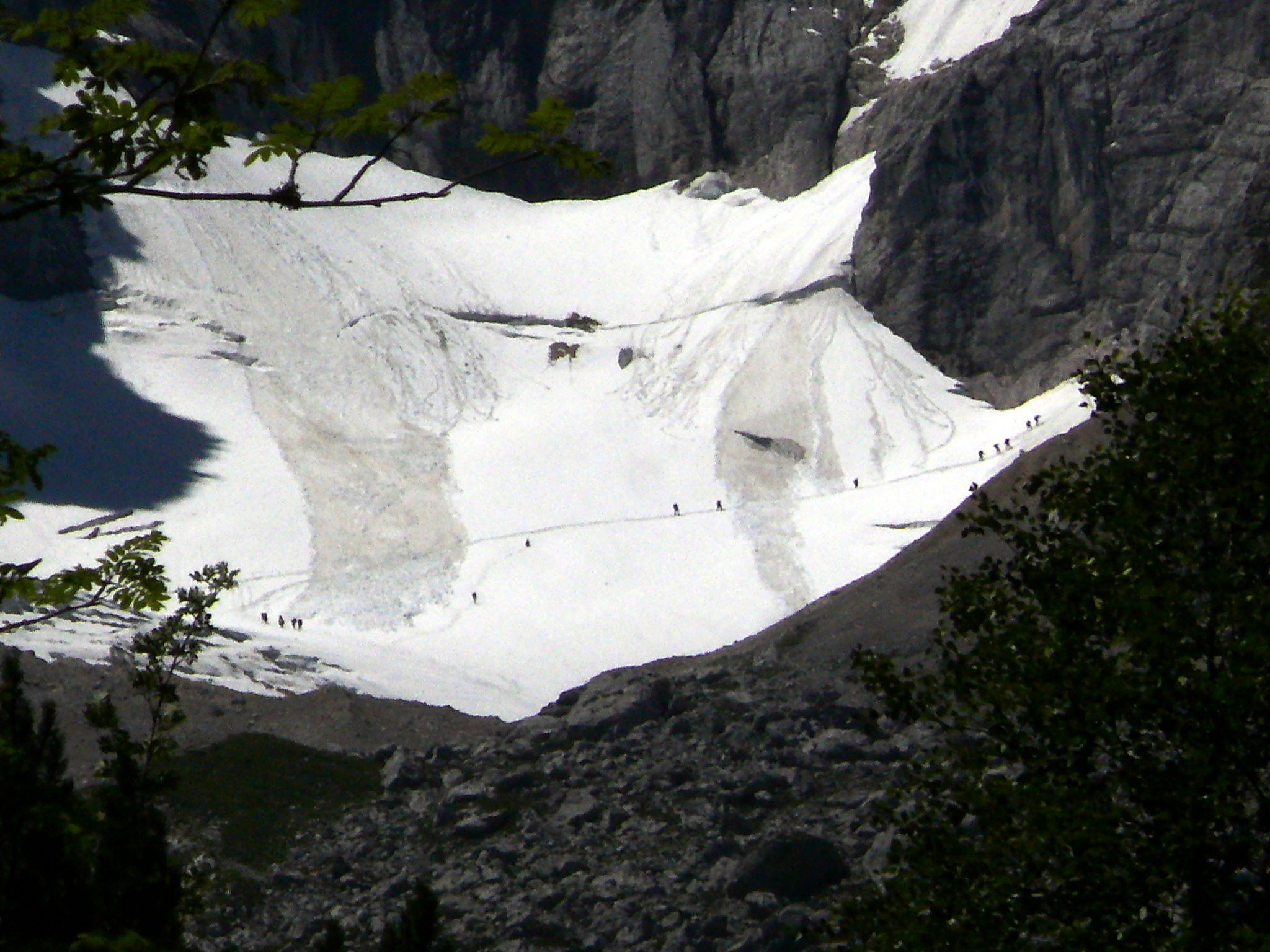 Bergsteiger auf dem Höllentalferner